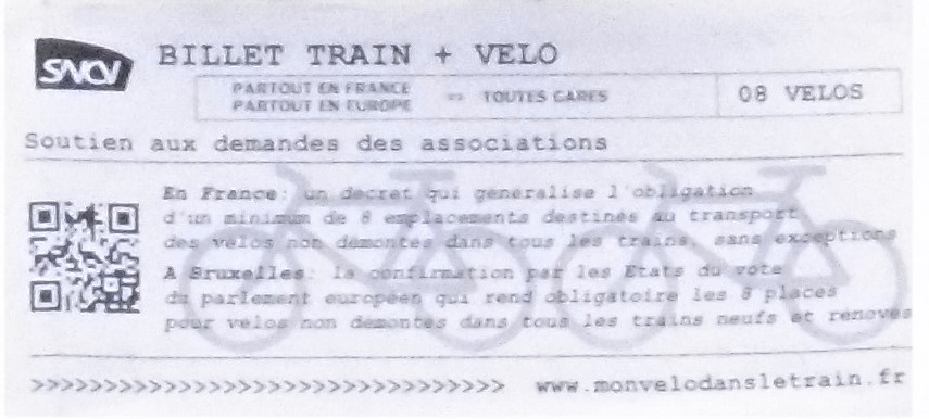 Billet soutien aux associations 8 places vélo dans chaque train. Manifestation du 4 juillet 2020 devant la gare de Lyon à Paris